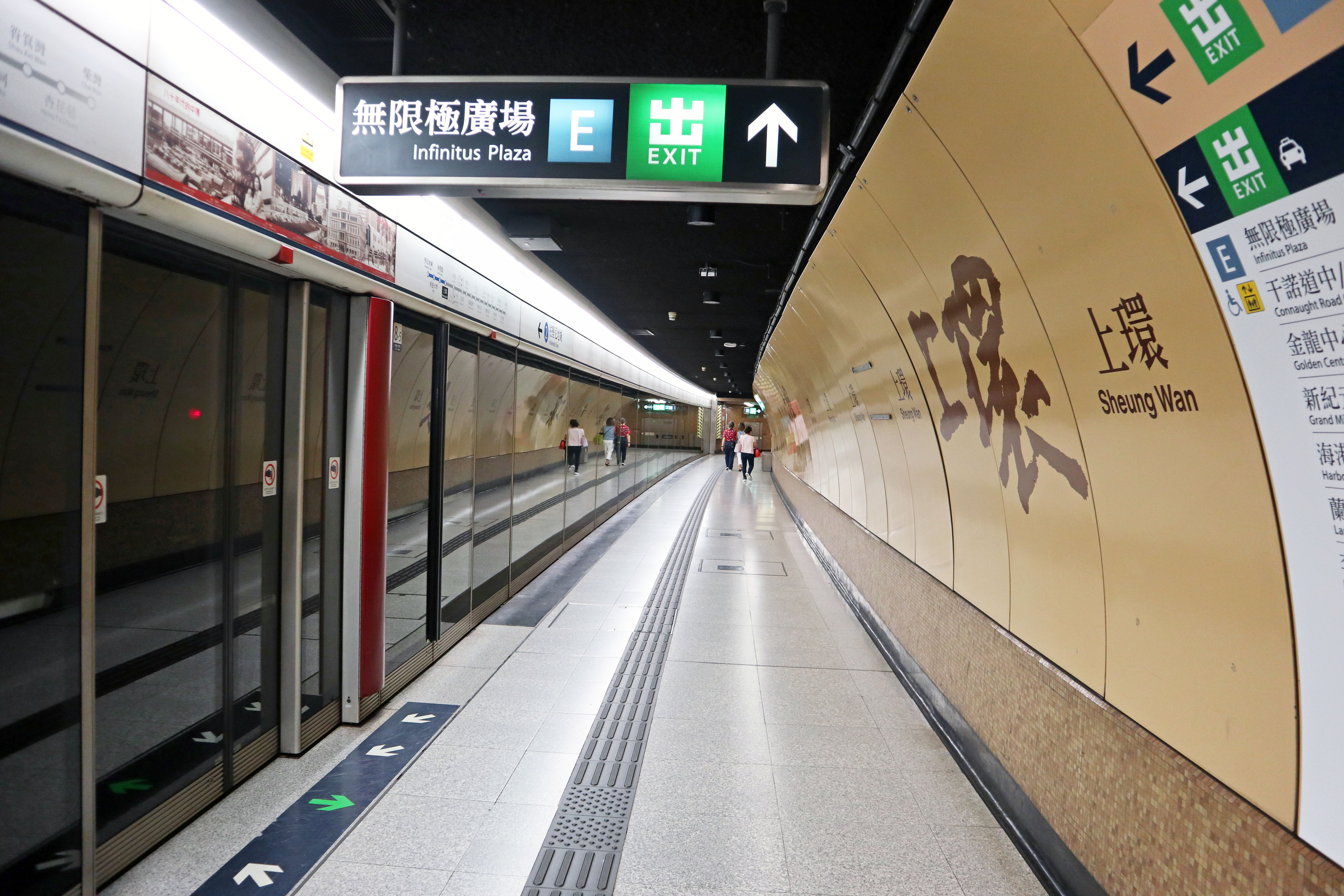 港鐵上環站月台